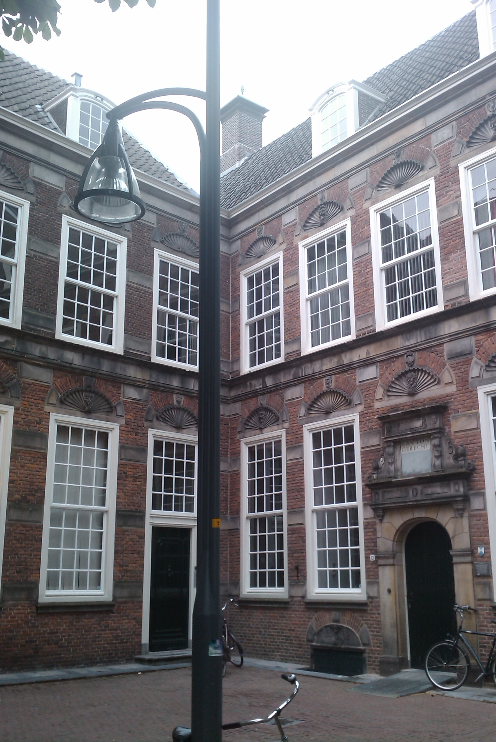 Rijksmonument, Deventer, Nederland (The Netherlands)